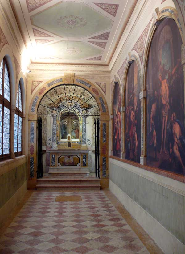 Oraorio del Cristo al Castello-interno